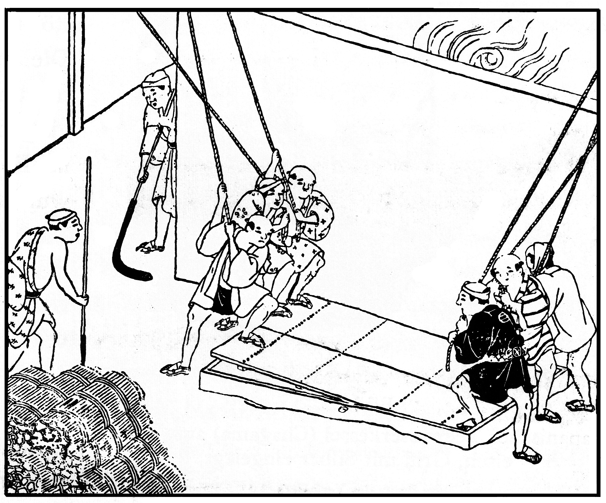 Japanischer Tatara-Ofen mit Flügelgebläse (18. Jahrhundert) - nach Adolf Ledebur [Stahl und Eisen 21 (1901), S. 845)]